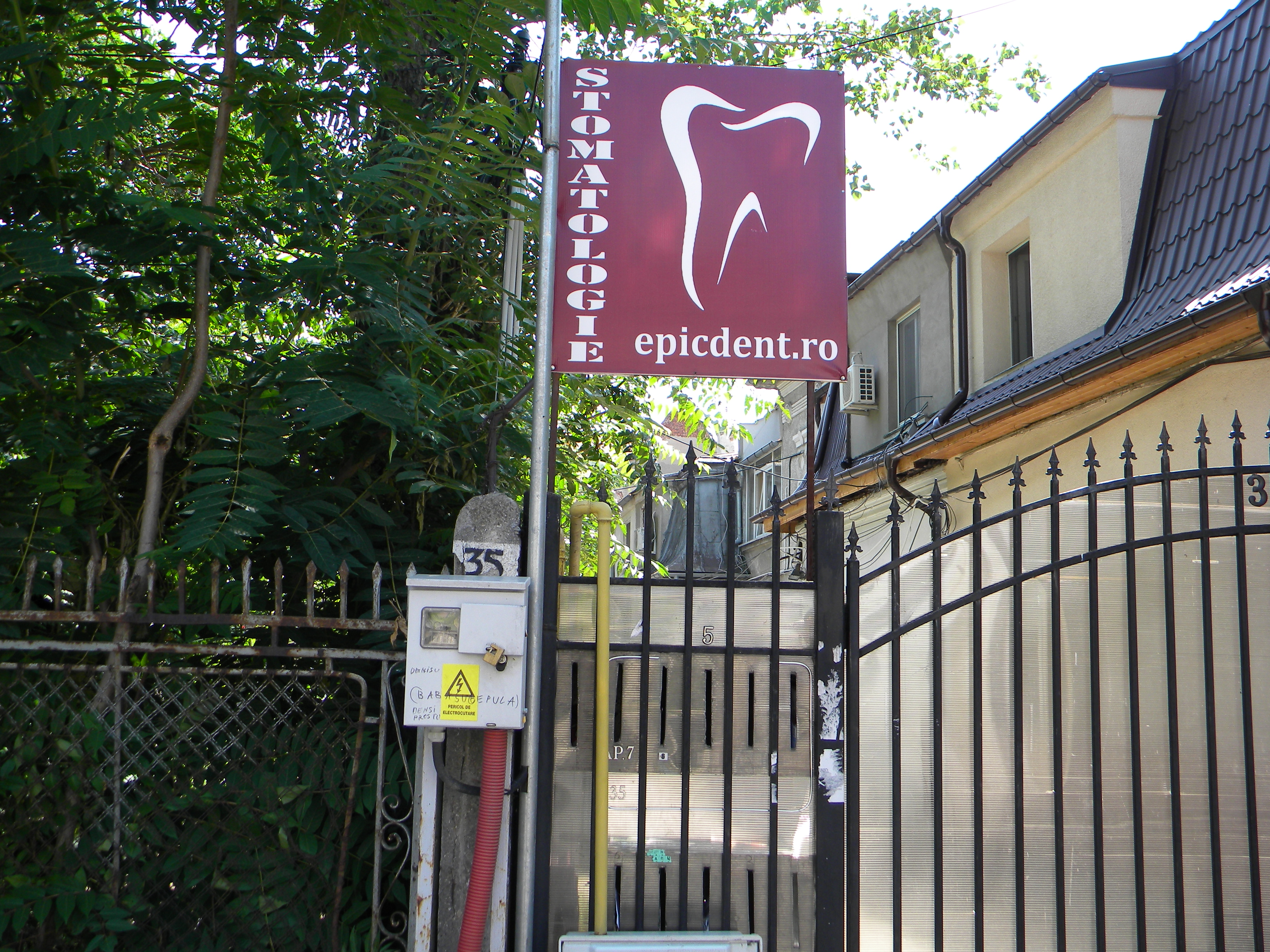 Bucuresti, Romania, Casa pe Str. Parfumului nr. 35; B-II-m-B-19343